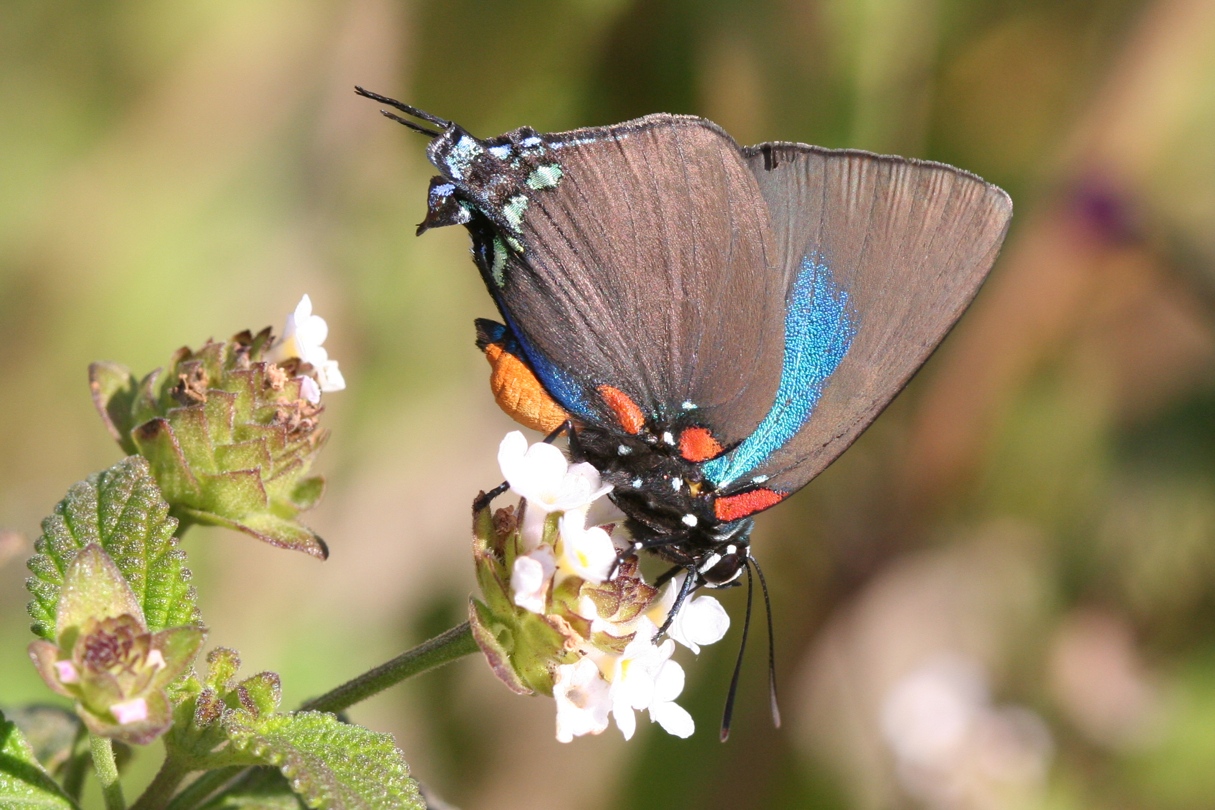 Atlides halesus, Roma, Texas, USA